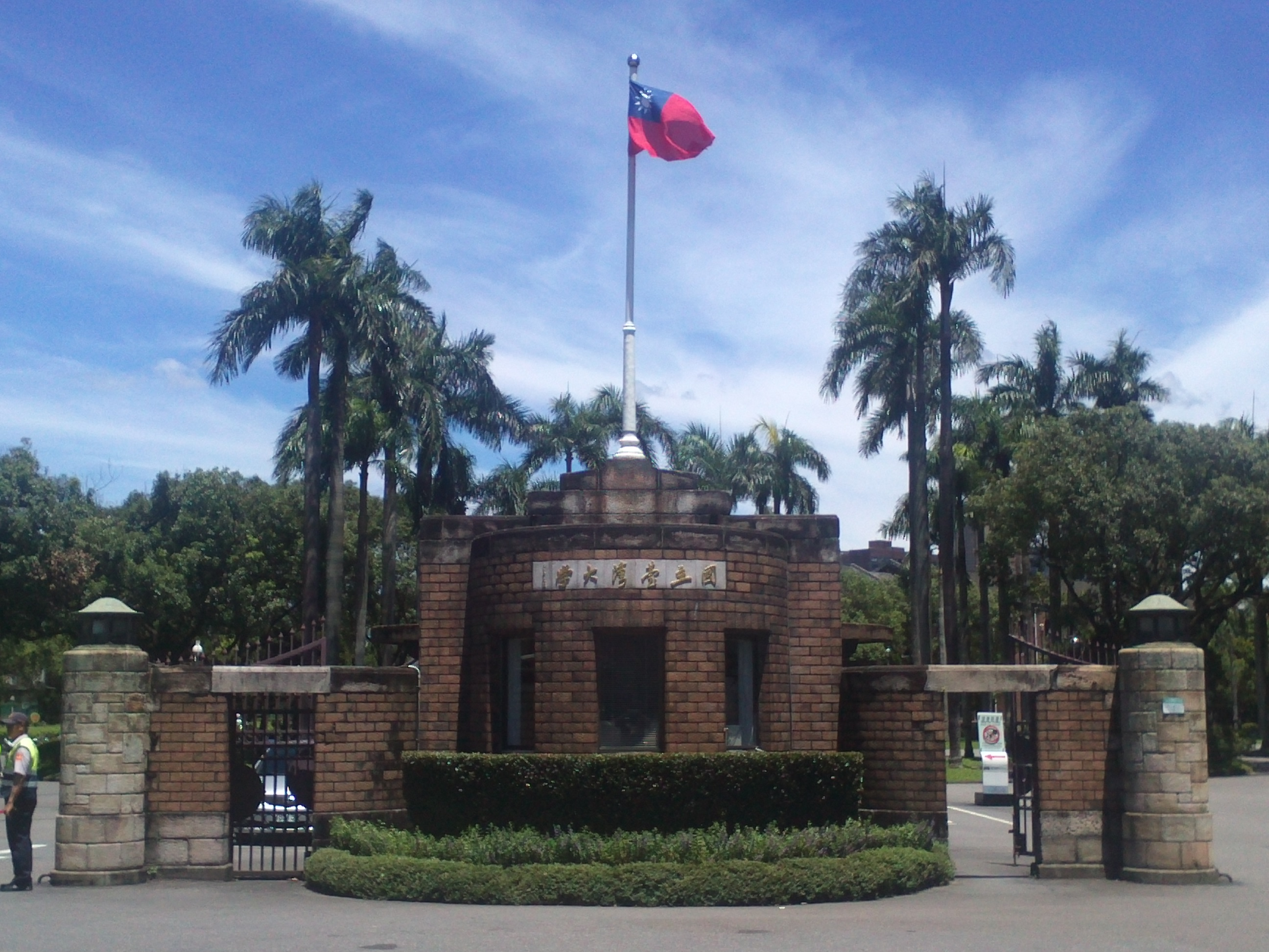 中文（台灣）: 台灣大學校門